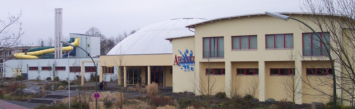 Badeparadies Atlantis in Dorsten